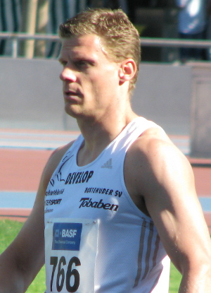 Nils Winter beim Olympia-Qualifikationswettkampf 2012 im Stadion der MTG Mannheim.